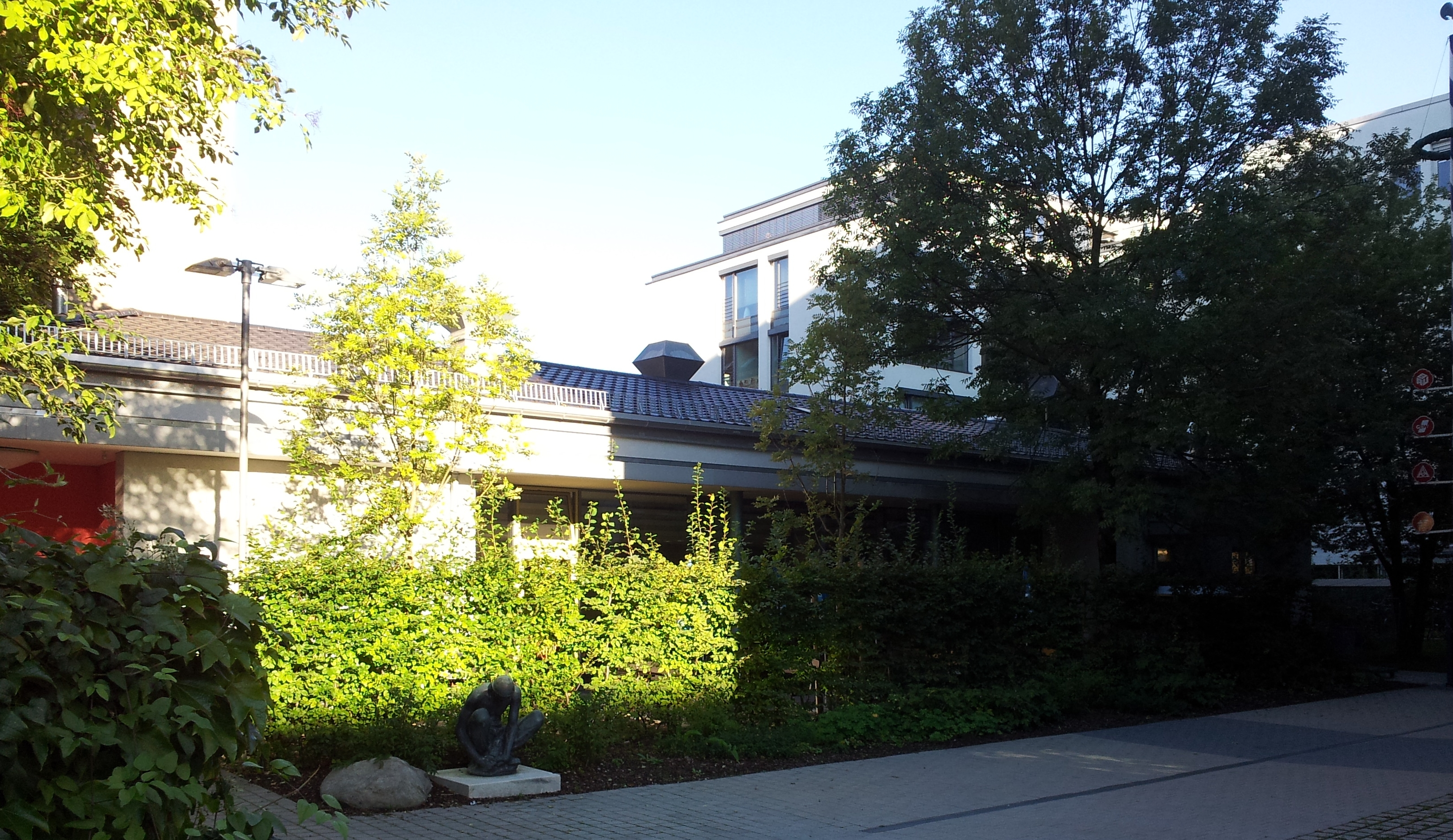 Ehemalige Bibliothek und heutige Kantine des Gewerkschaftshauses München